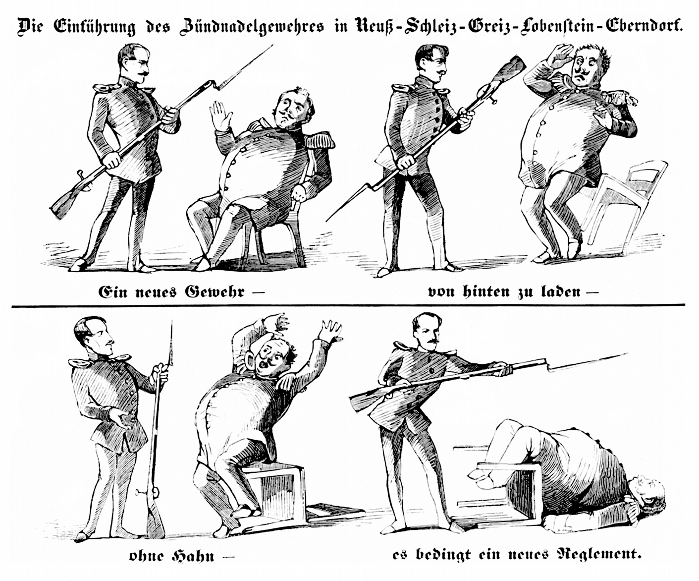 "Einführung des Zündnadelgewehrs", in: Kladderadatsch Nr. 33, 1852